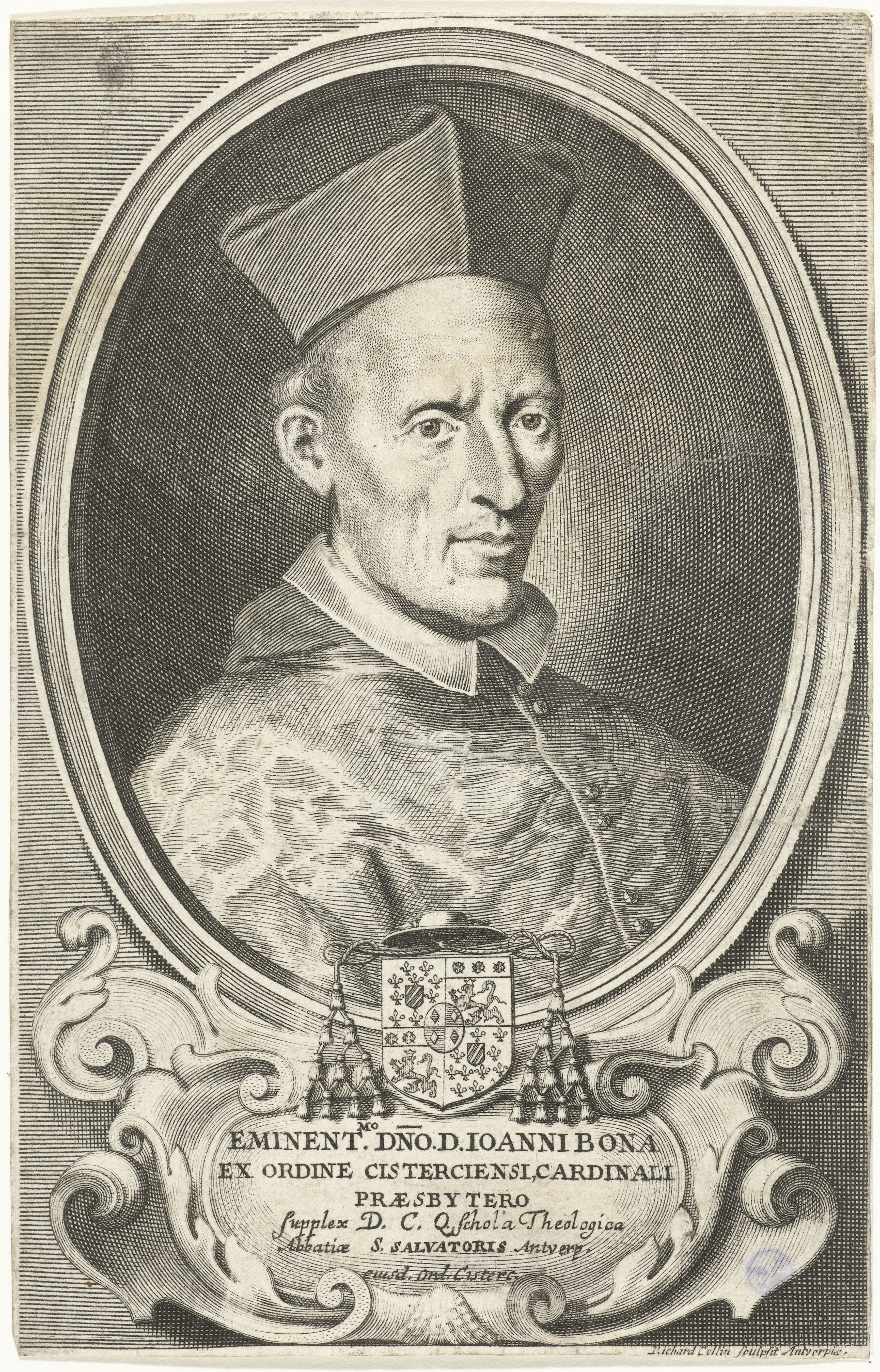 IdentificatieTitel(s): Portret van kardinaal Johannes BonaObjecttype: prent Objectnummer: RP-P-1905-159Opschriften / Merken: verzamelaarsmerk, verso, gestempeld: Lugt 2228Omschrijving: Borstbeeld van de Italiaanse kardinaal Johannes Bona, in ovaal met zijn familiewapen, naam en titels.VervaardigingVervaardiger: prentmaker: Richard Collin (vermeld op object)Plaats vervaardiging: AntwerpenDatering: ca. 1674 - ca. 1678Fysieke kenmerken: gravureMateriaal: papier Techniek: graveren (drukprocedé)Afmetingen: blad: h 180 mm × b 115 mmOnderwerpWie: Giovanni BonaVerwerving en rechtenCredit line: Schenking van de heer C. ScheiblerVerwerving: schenking 1905Copyright: Publiek domein